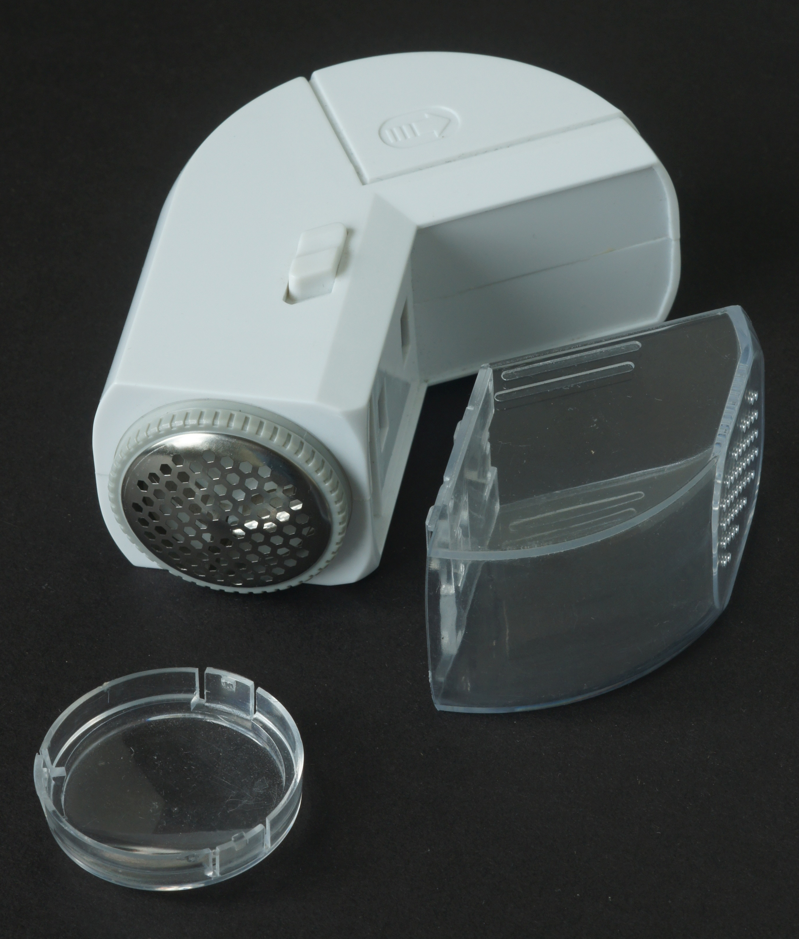 Ein batteriebetriebener Noppenrasierer, dazu gedacht, noppig gewordene Pullover u.ä. von selbigen wieder zu befreien.